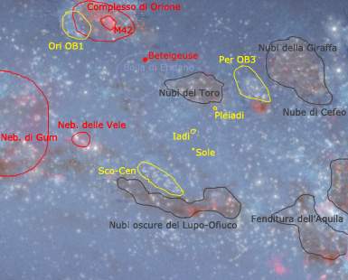 Mappa del Braccio di Orione con in evidenza Betelgeuse